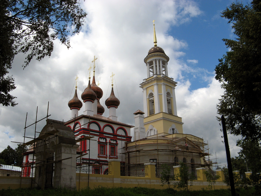 Анно-Зачатьевская церковь (1689-1694; колокольня - 1820) в г. Чехов (Московская область)